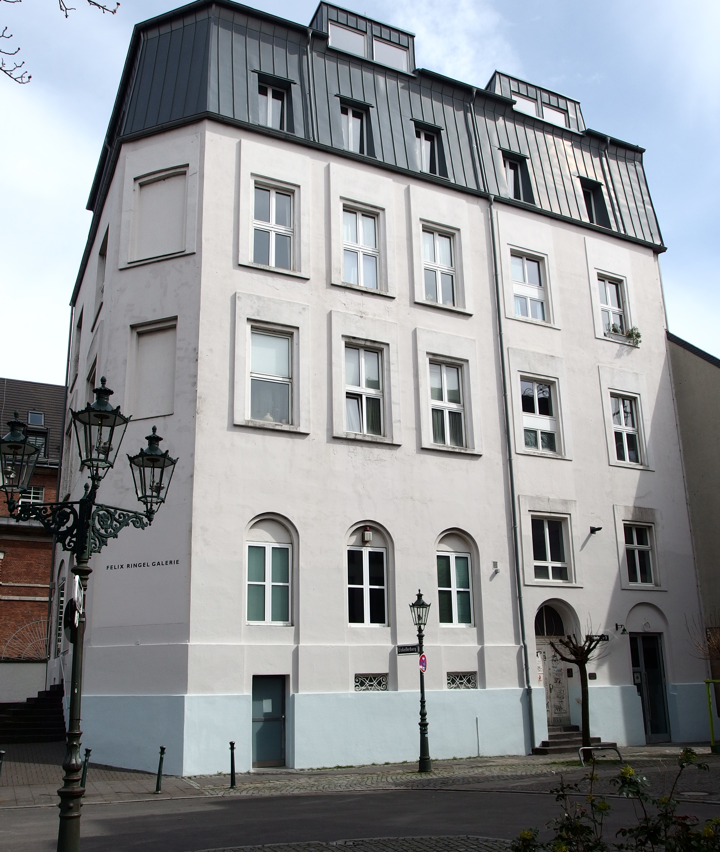 Haus Eiskellerberg 1-3